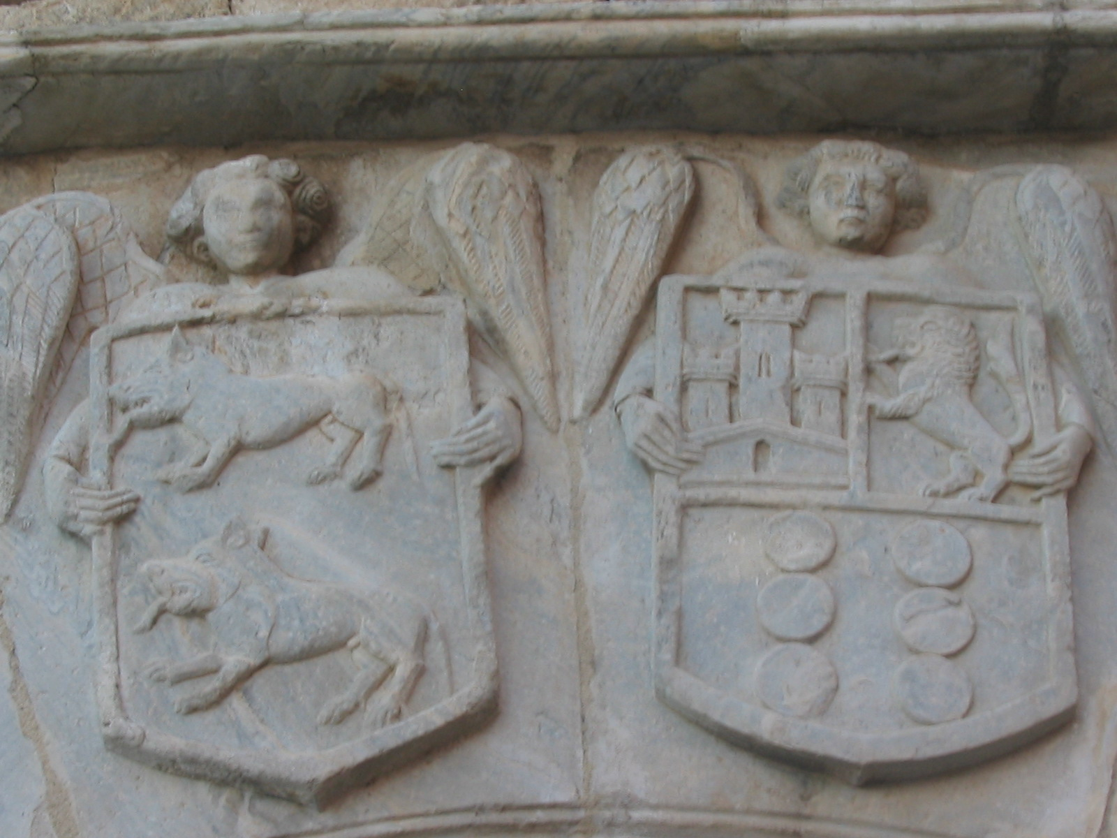 Counts of Lemos's Coat of Arms on Monforte de Lemos's Condal Palace. (escudo de los condes de Lemos en el palacio condal de Monforte)